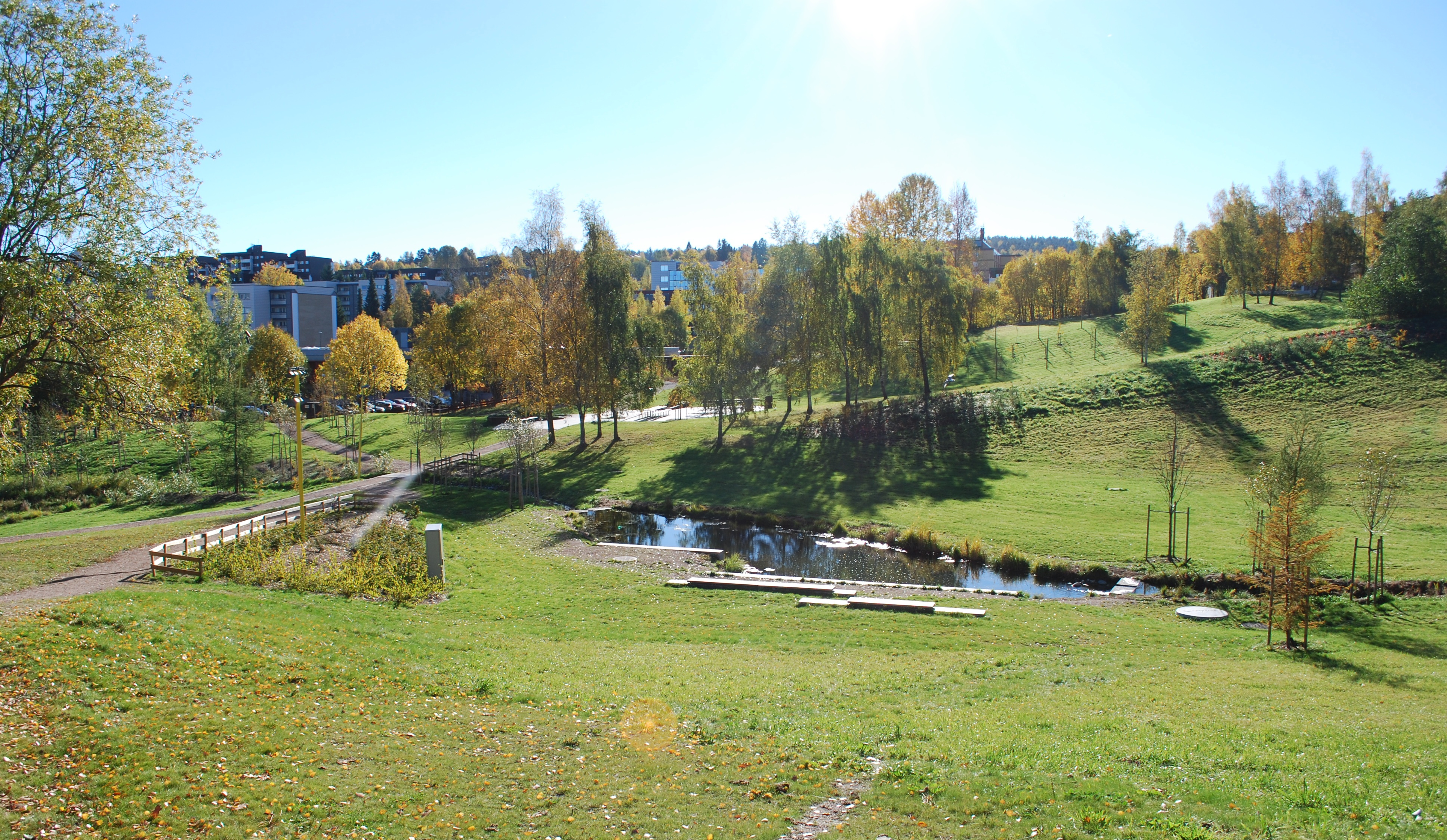 Verdensparken, Furuset, Oslo, med ravinedaler bekk og dam, sett mot sør